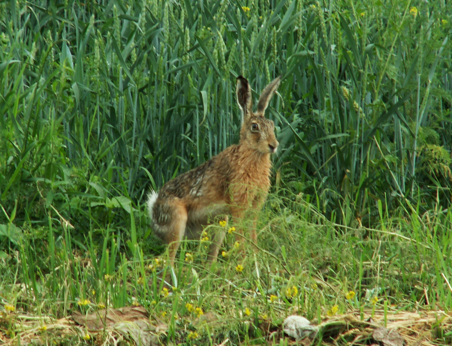 Zając szarak późną wiosną